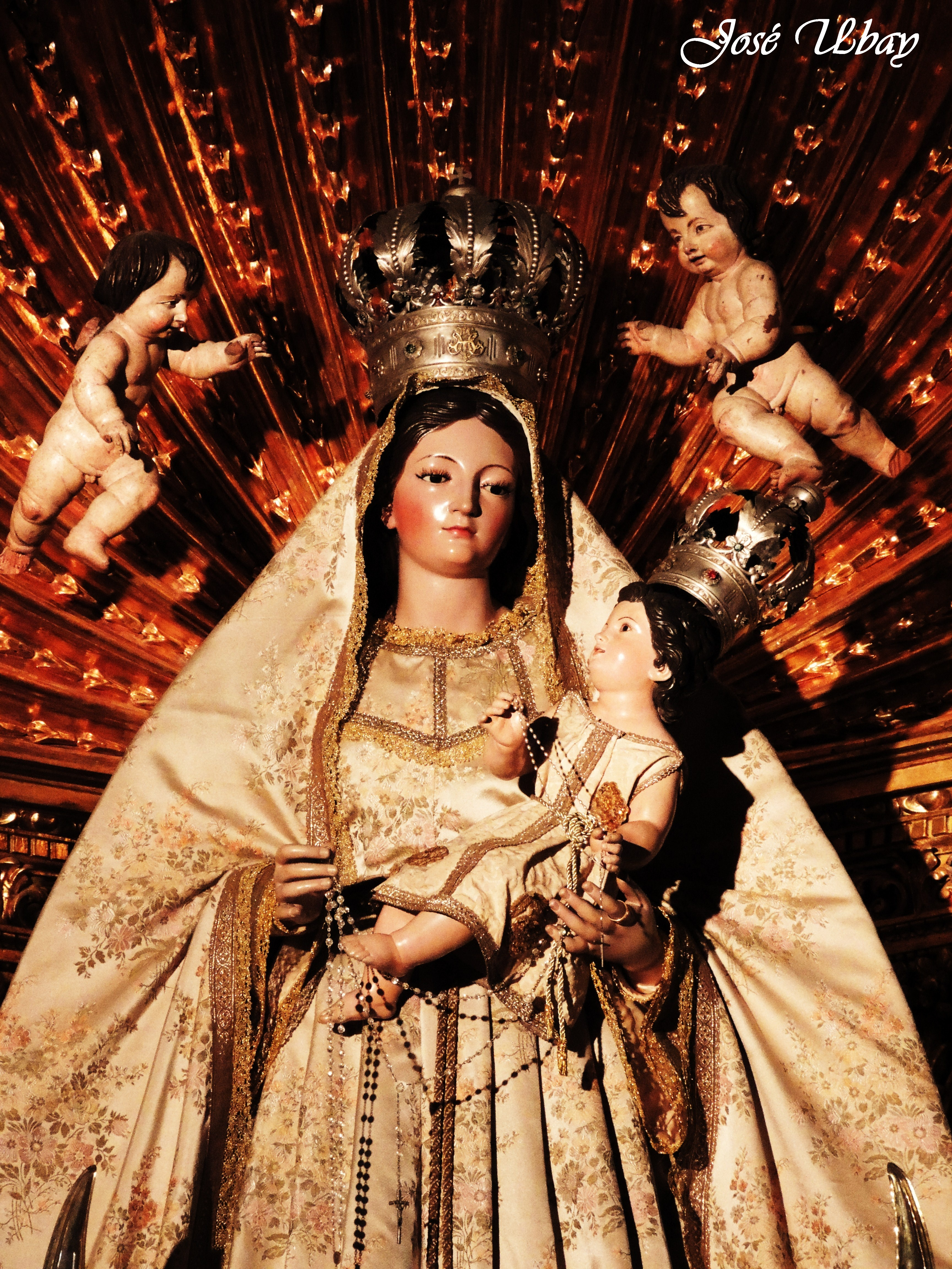 Nuestra Señora del Rosario. Obra de Fernando Estévez. Posterio a 1820. Parroquia de Santo Domingo de Guzmán.